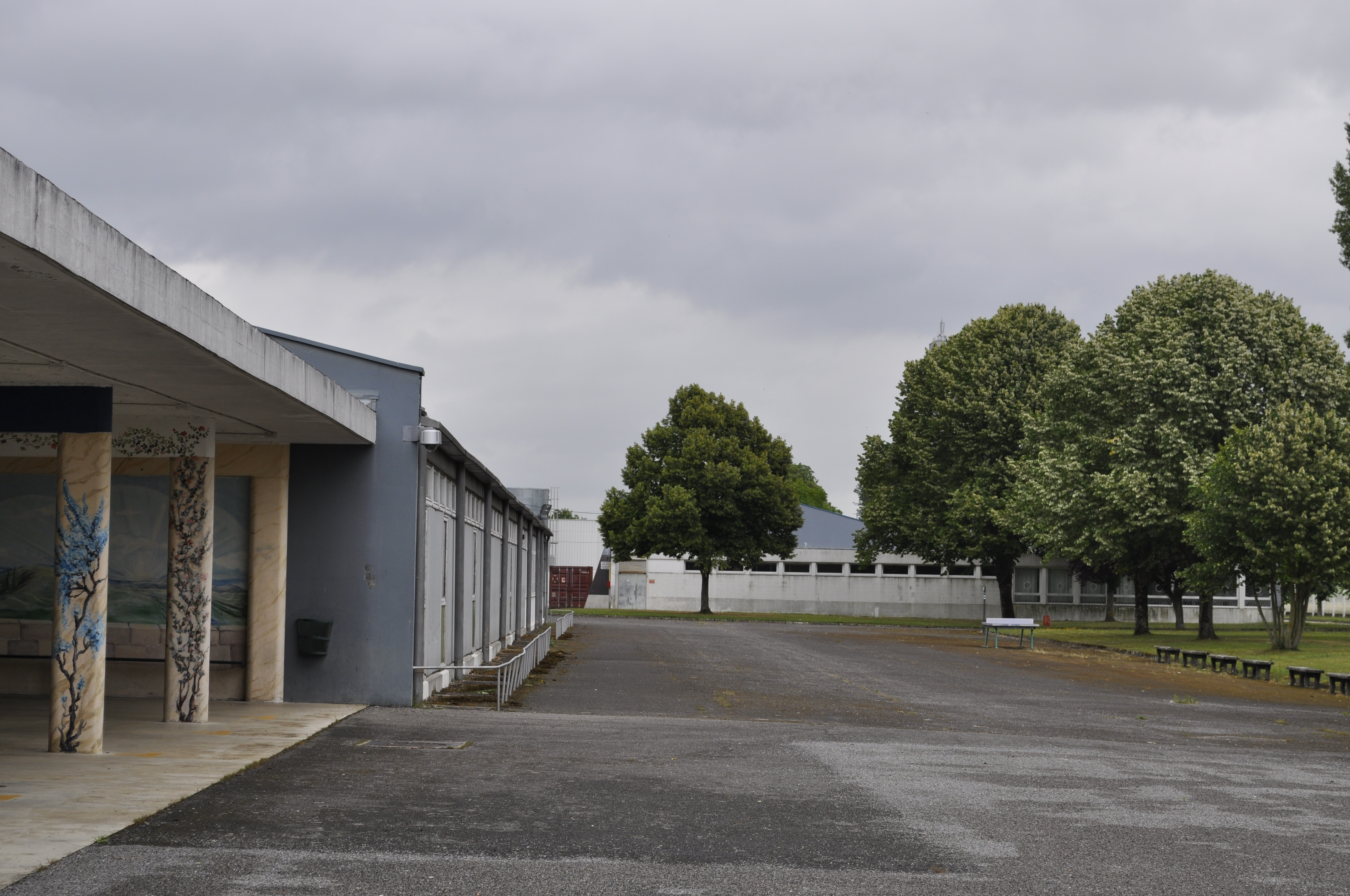 Cité scolaire François Ier de Vitry-le-François (51300) : bâtiments Eiffel et Cugnot.